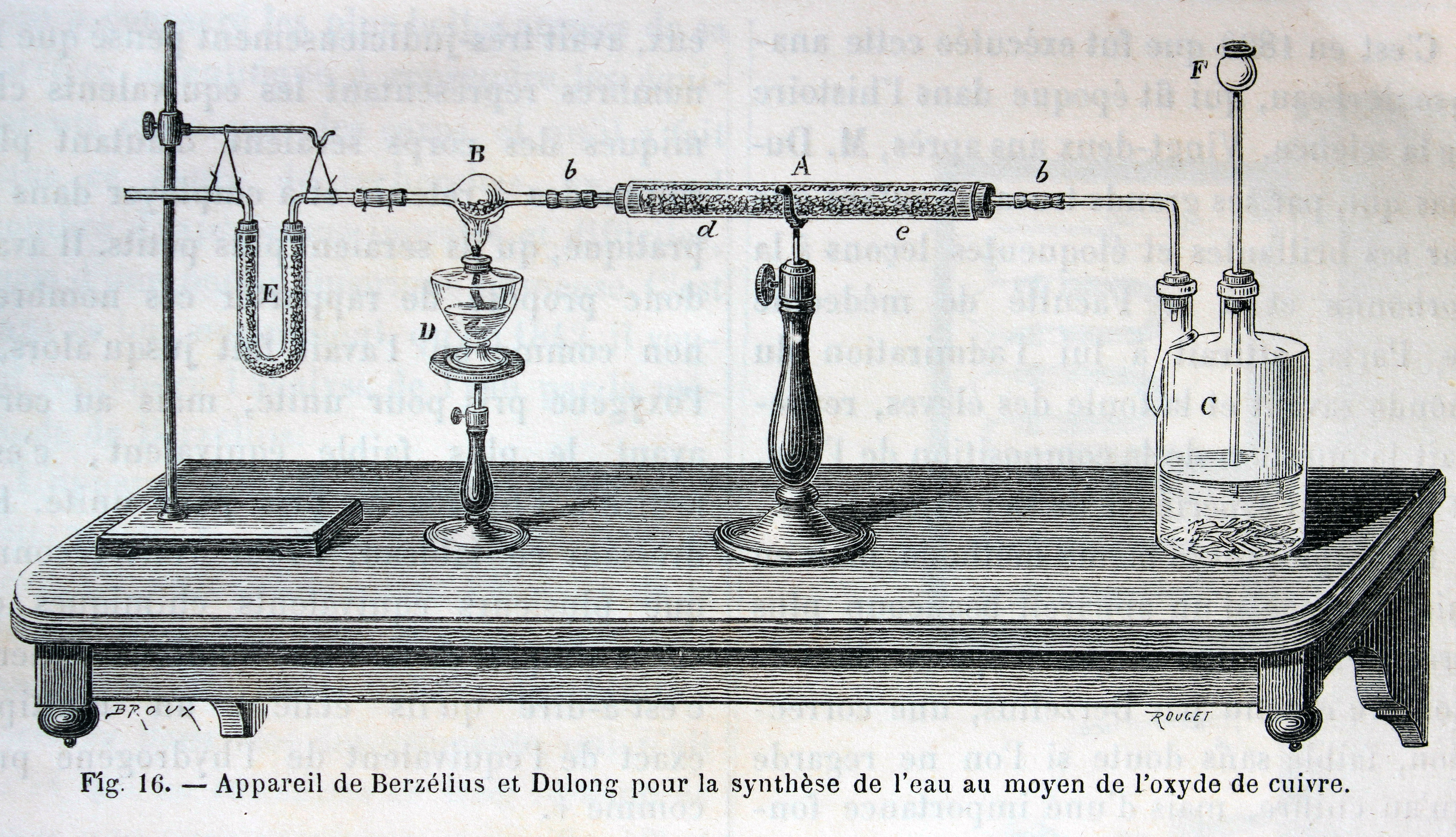 Ilustraciones de la obra : Les merveilles de l'industrie ou, Description des principales industries modernes / par Louis Figuier. - Paris : Furne, Jouvet, [1873-1877]. - Tome III